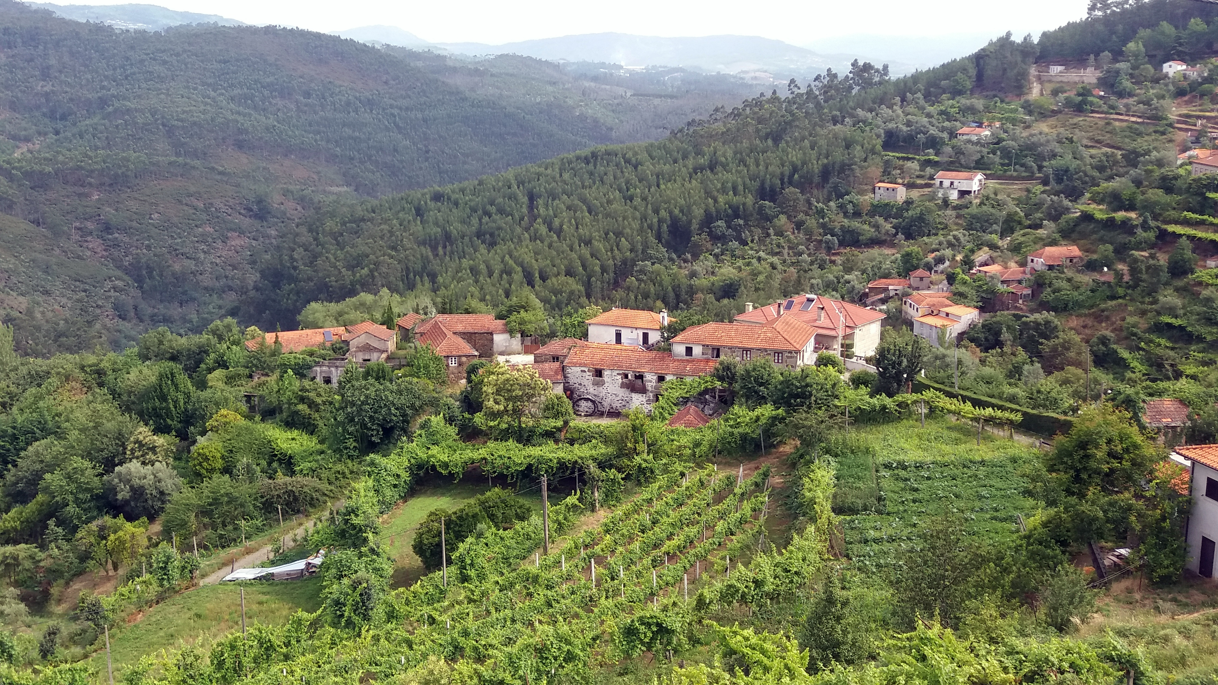 Amarante Rebordelo